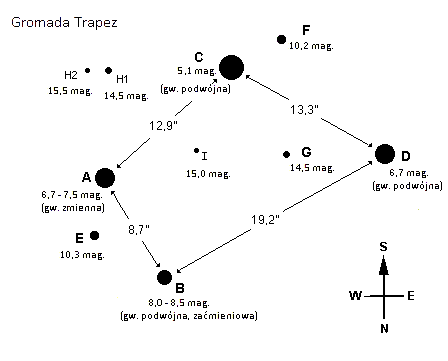 praca własna na podstawie dostępnych informacji